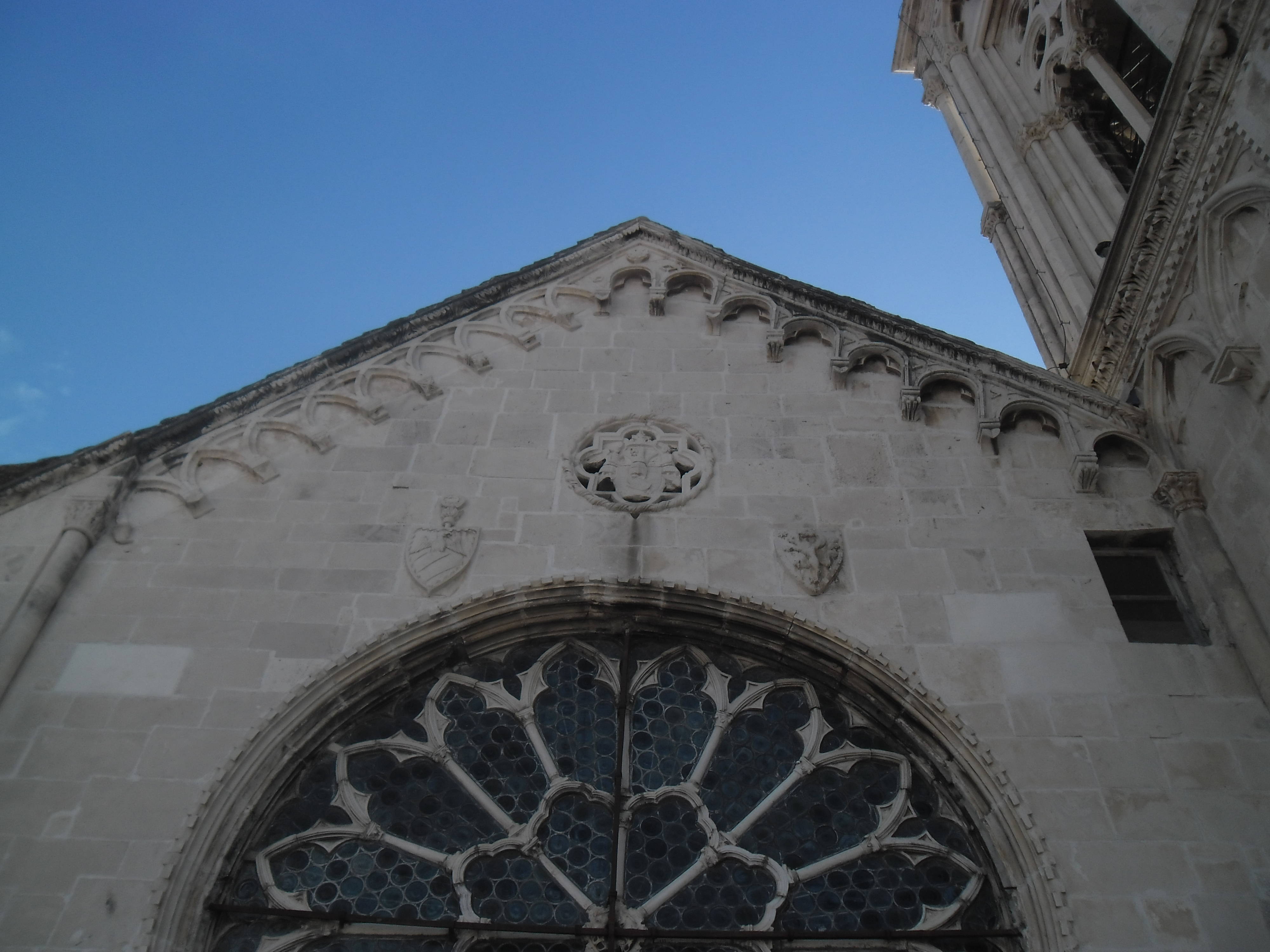 Trogir